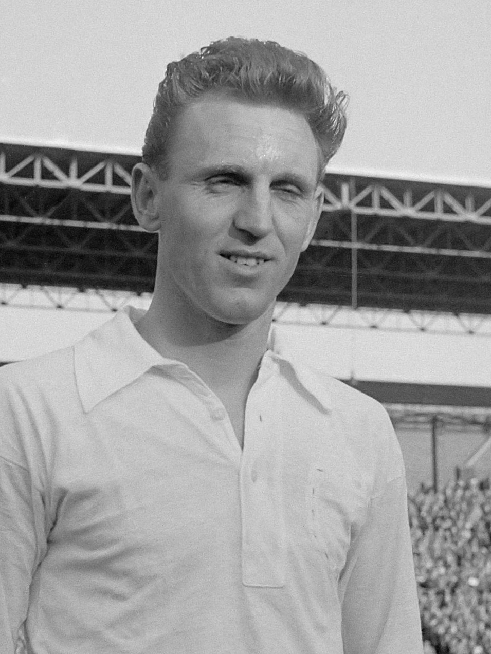 Voetbal. Schuurman (ADO) 18 maart 1957